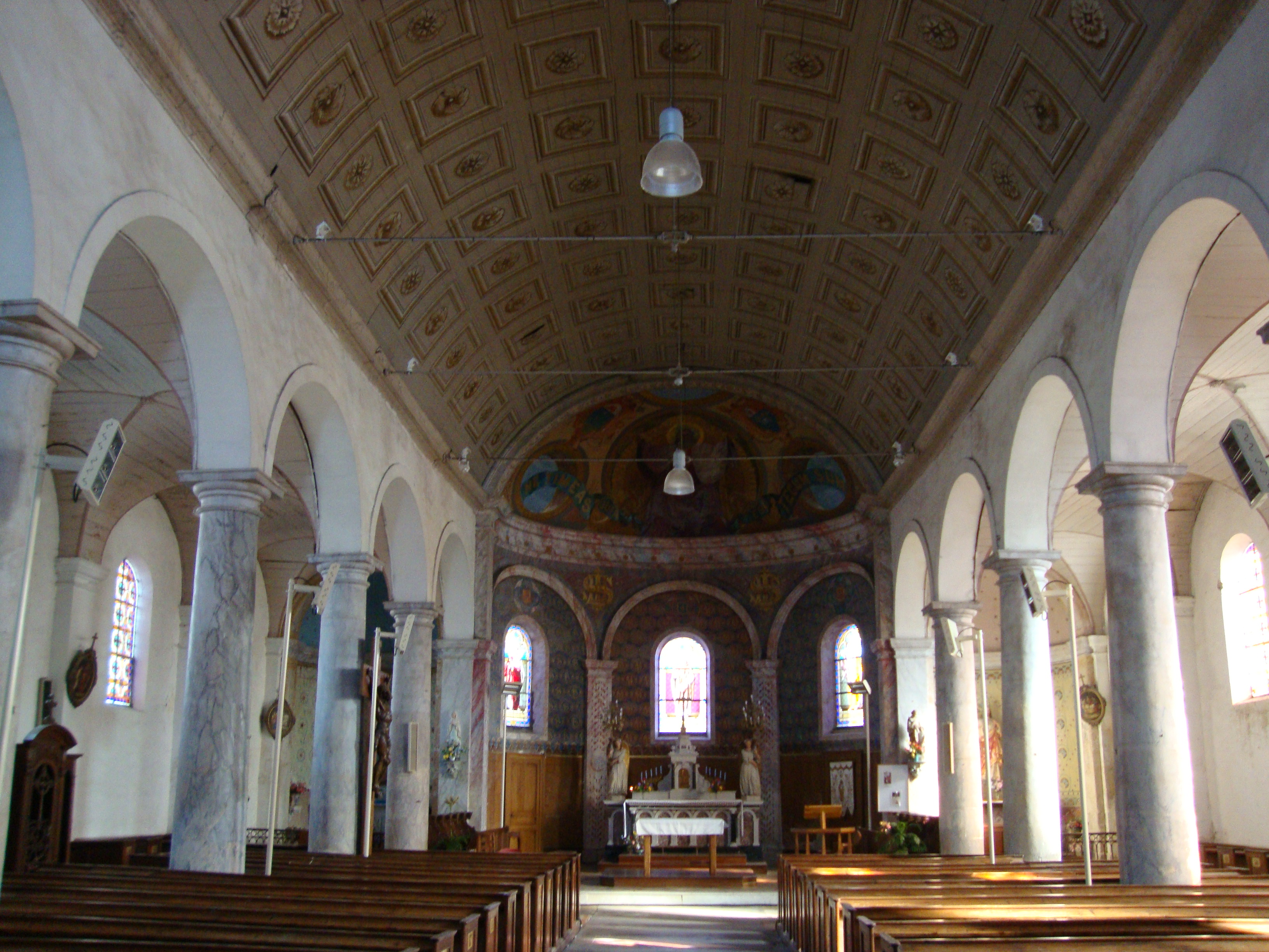 Église Saint-Maxent de Vouillé-les-Marais